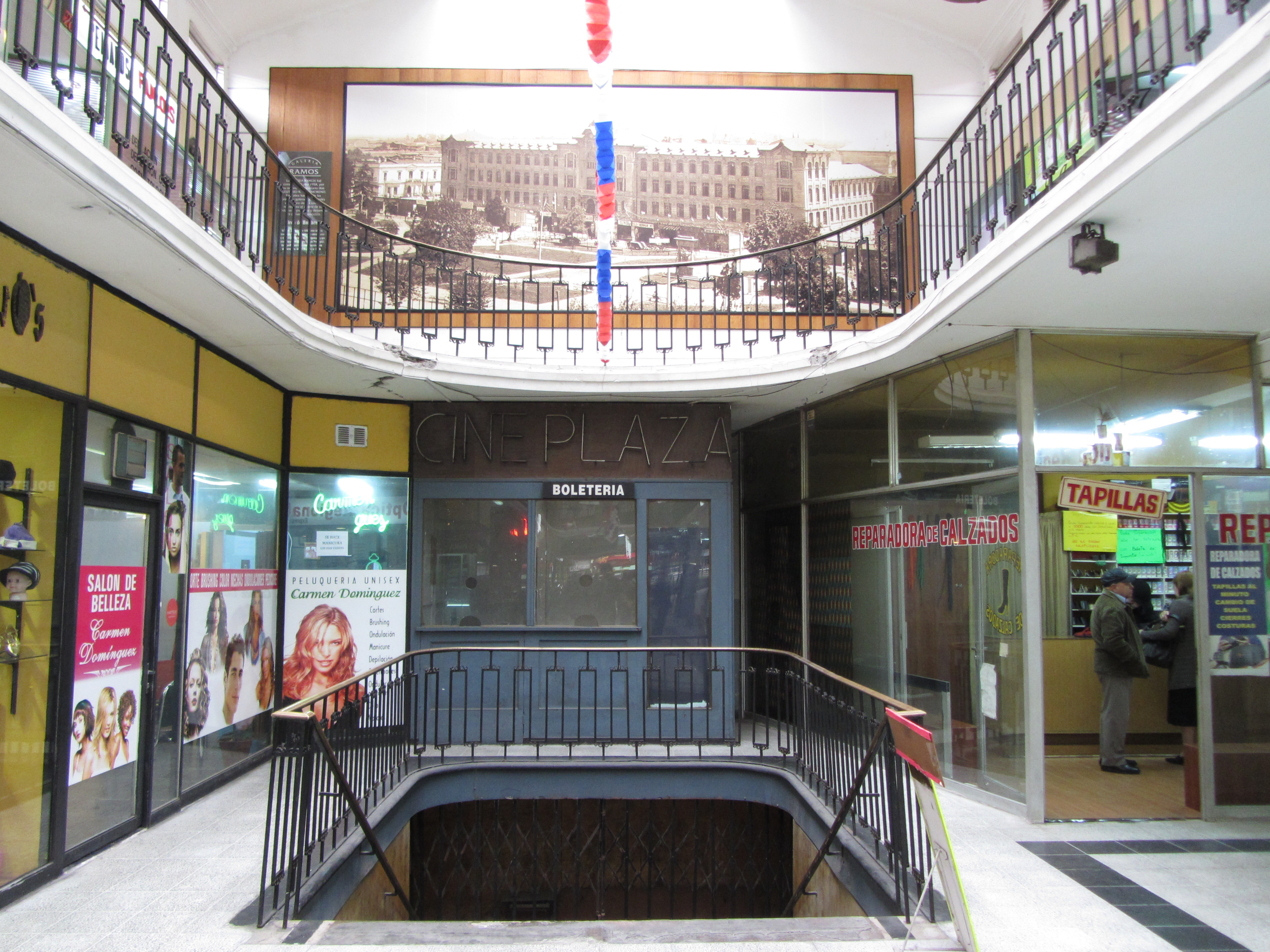 Boletería del ex Cine Plaza en la Galería Ramos Concepción, Chile Septiembre de 2012